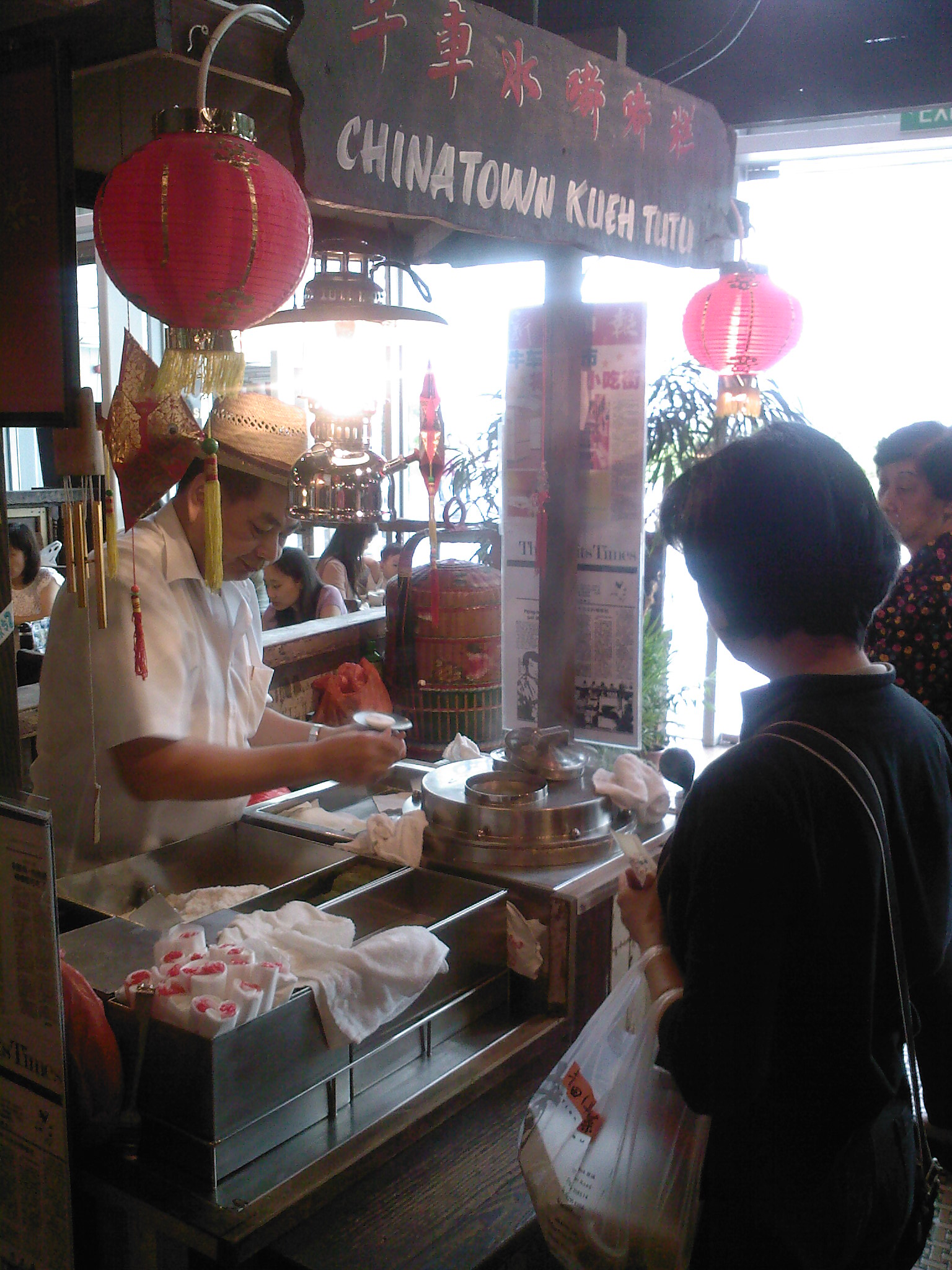 Kueh tutu.